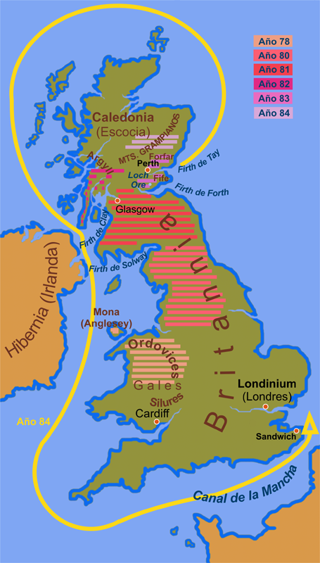 Mapa de las campañas militares de Gneo Julio Agrícola en Britania (años 78-84).